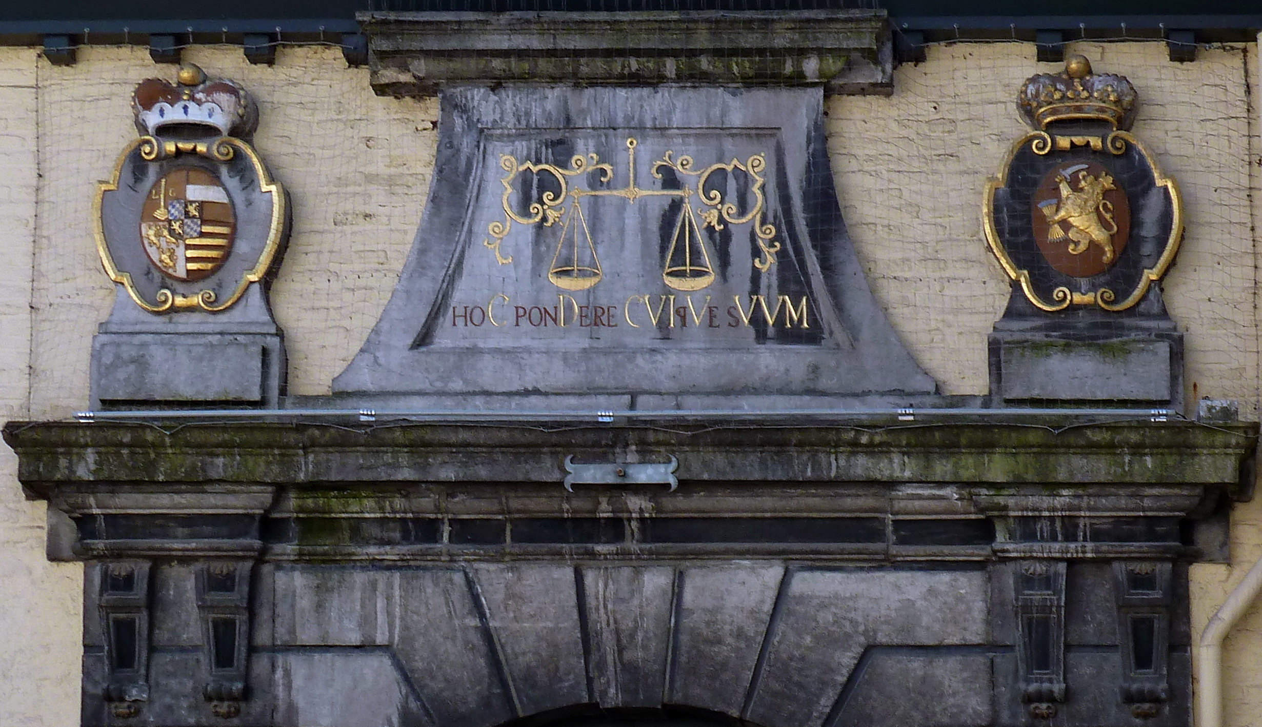 Voormalige wolwaag. Huis met lijstgevel en voorzien van een poort, waarboven zich de wapens bevinden van de bisschop (Jozef Clemens van Beieren) en de staten (Brabant) en een chronogram, 1721.